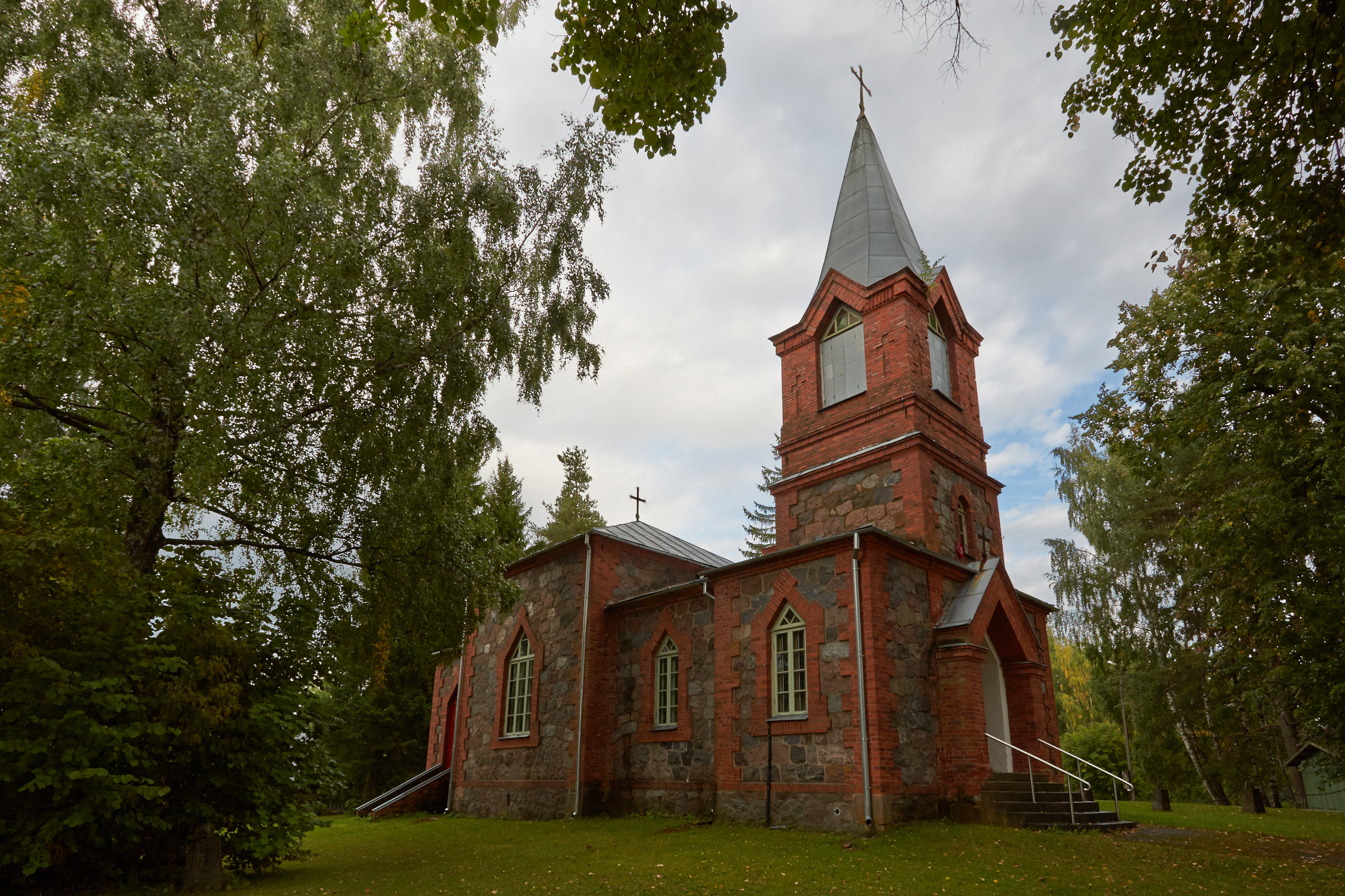 Kähri õigeusu kirik 2013. aasta augustis.